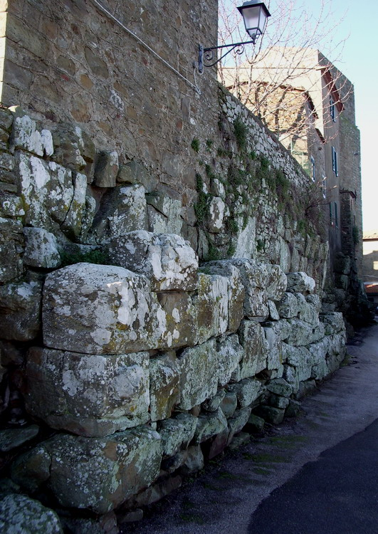 Resti delle Mura Ciclopiche (dell'Arce) a Vetulonia (GR)